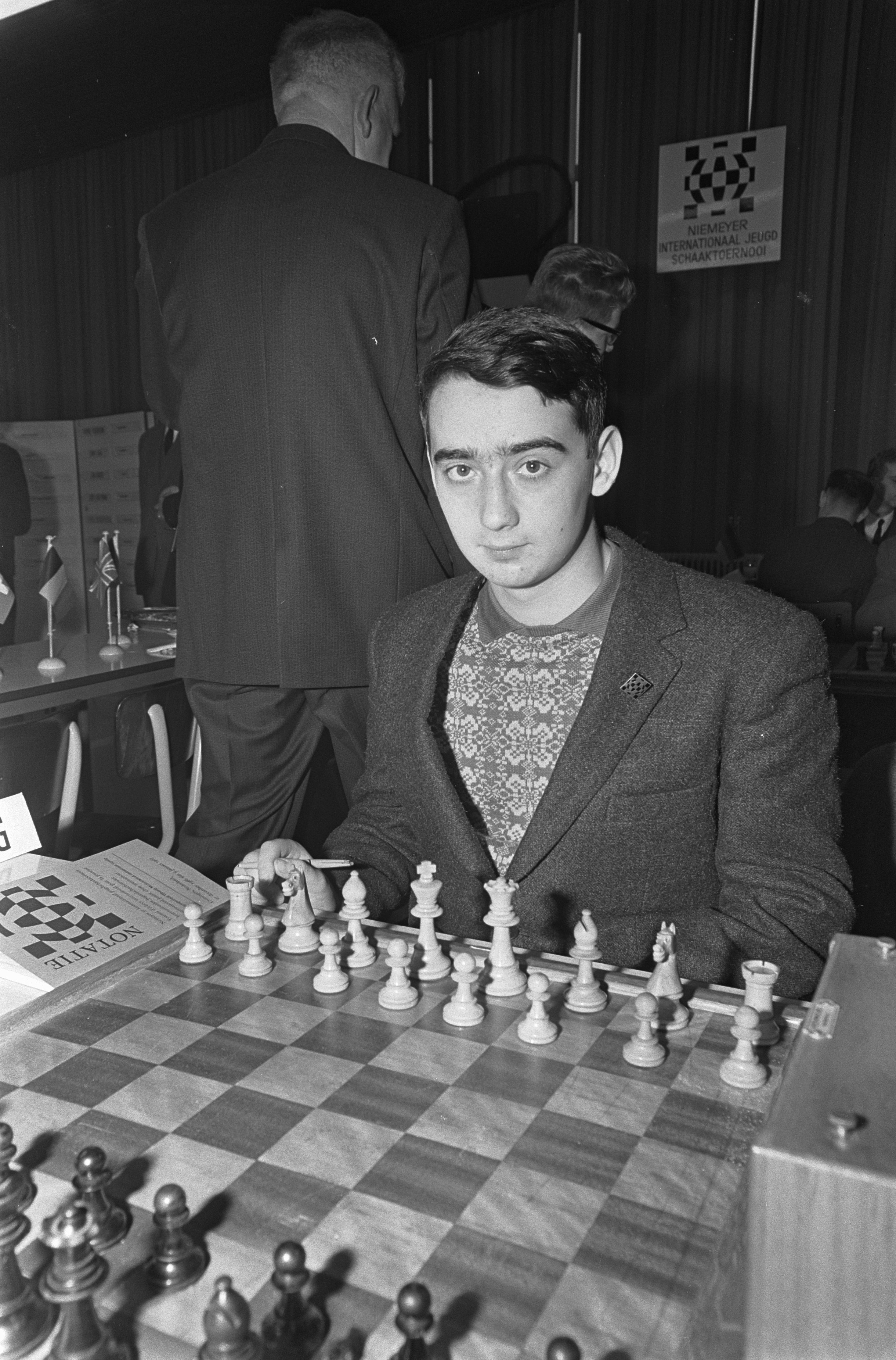 Collectie / Archief : Fotocollectie Anefo Reportage / Serie : [ onbekend ] Beschrijving : Internationaal Jeugdschaaktoernooi te Groningen, Mikhail Steinberg (Rusland) Datum : 27 december 1966 Locatie : Groningen, Rusland Trefwoorden : Schaken Fotograaf : Nijs, Jac. de / Anefo Auteursrechthebbende : Nationaal Archief Materiaalsoort : Negatief (zwart/wit) Nummer archiefinventaris : bekijk toegang 2.24.01.05 Bestanddeelnummer : 919-9130